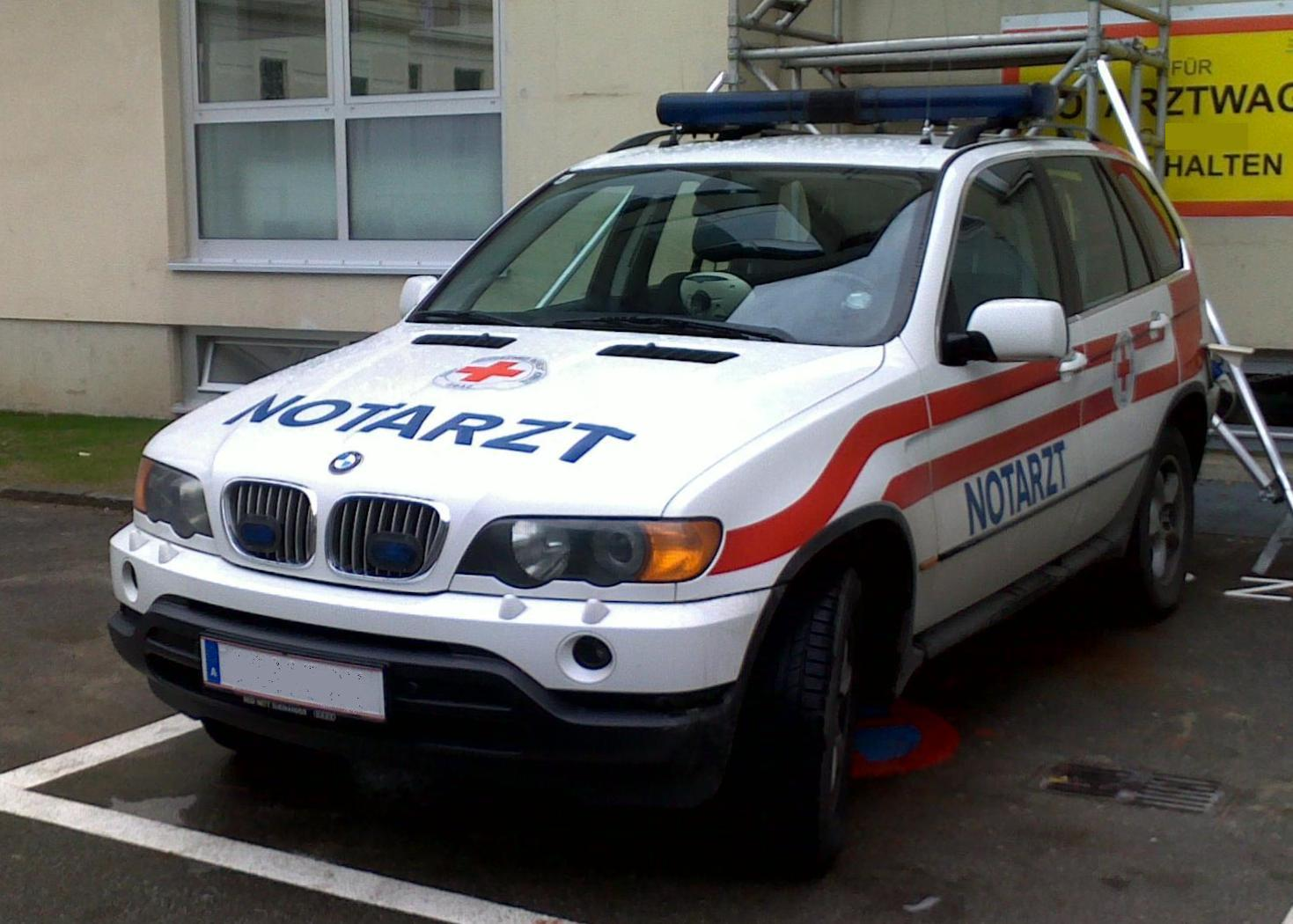 BMW E53, eines von zwei Notarzteinsatzfahrzeugen in Graz (stationiert im Landeskrankenhaus)